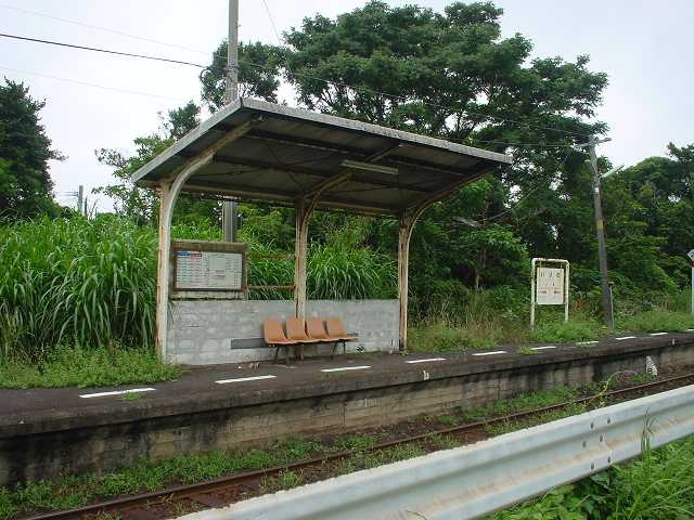 入野駅（2005年7月投稿者が撮影）